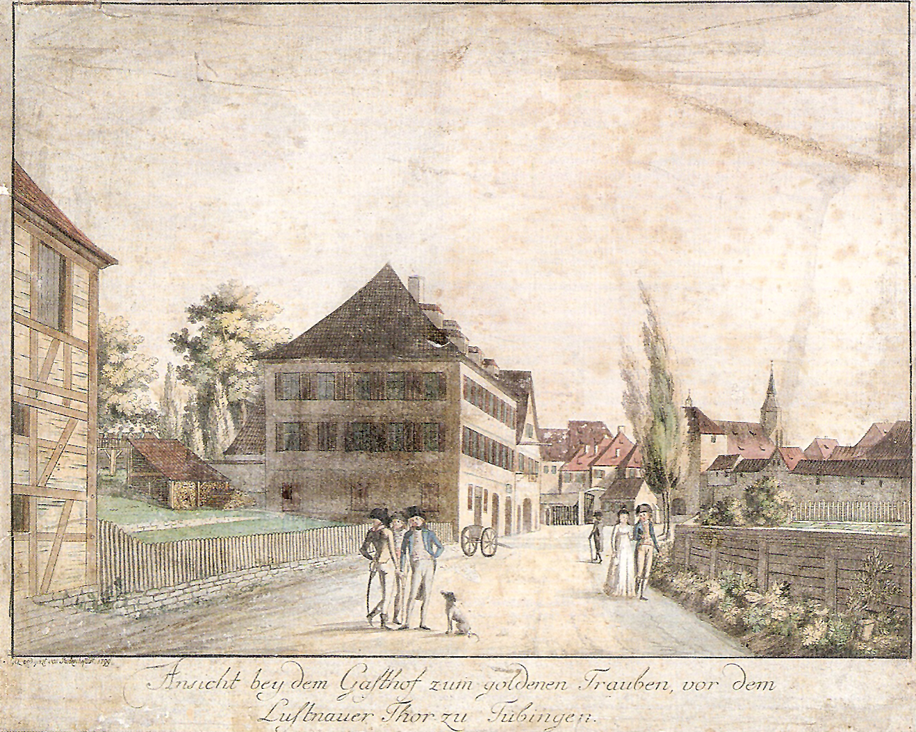 „Ansicht bey dem Gasthof zum goldenen Trauben vor dem Lustnauer Thor zu Tübingen“. Das Lustnauer Tor ist teilweise von einer Pappel verdeckt. Der Gasthof befand sich am Anfang der heutigen Wilhelmstraße und zwar ist das das heutige Haus Nr. 8, das später umgebaut und vergrößert wurde. (aquarellierte Radierung, Blatt 20,6 × 25,7 cm, Träger 29,5 × 35 cm); Schefold 9408